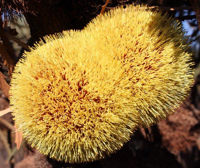 Banksia laevigata var. fuscolutea Forrestiana Rd